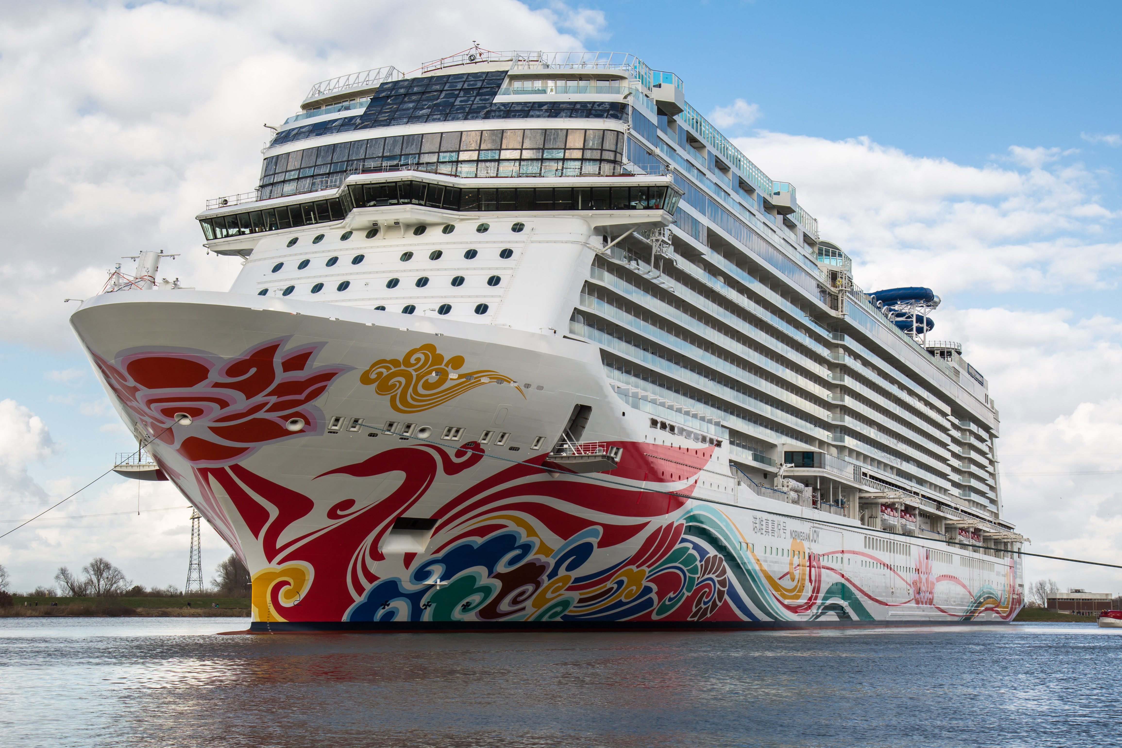 Die Norwegian Joy im Werfthafen der Meyer Werft